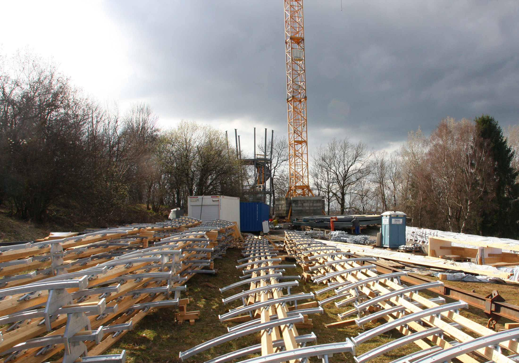 Baustelle Jübergturm Hemer